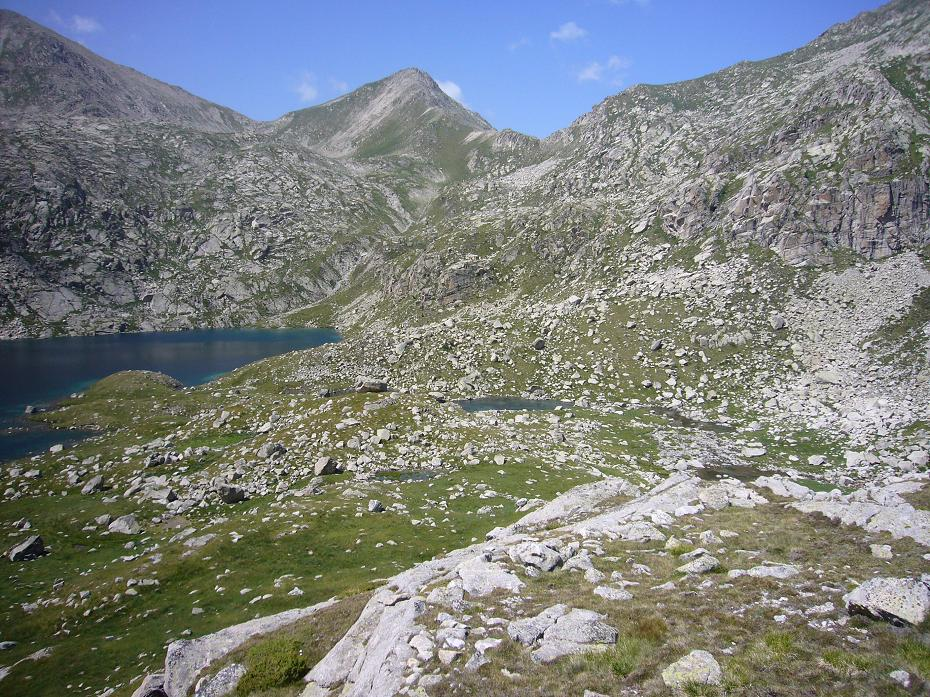 Pic i Collada de Dellui vistos a cavall dels extanys Eixerola i de Castieso; la Torre de Cabdella ,Pallars Jussà, Catalunya